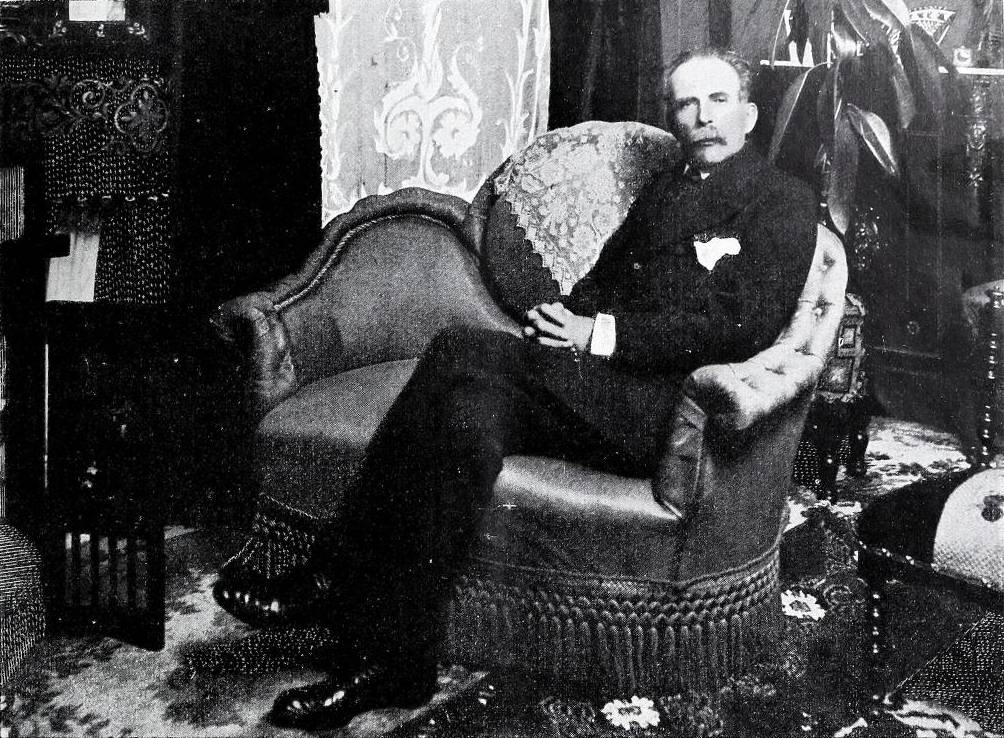 José Ferreras.